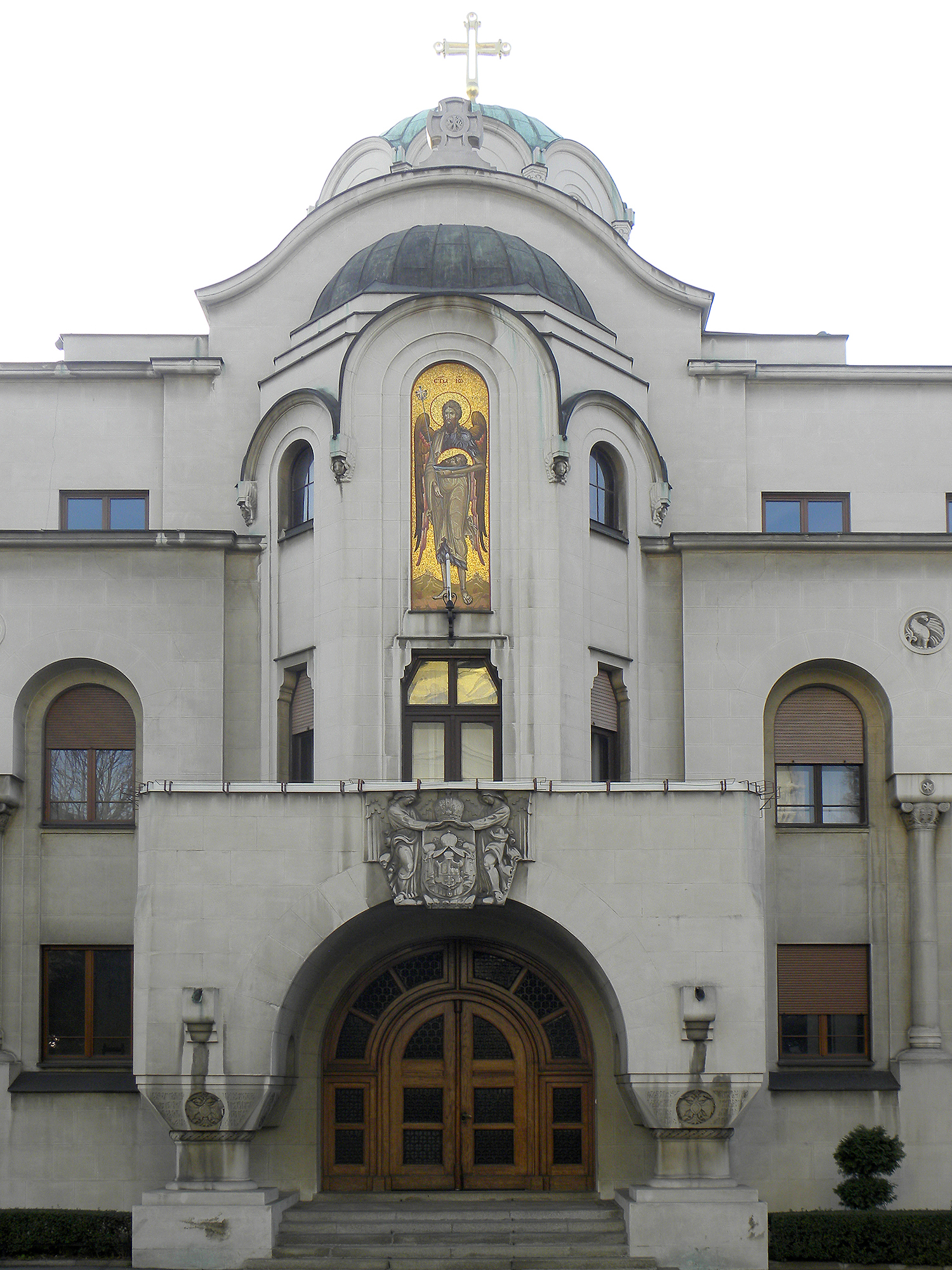 Patrijaršija u Beogradu